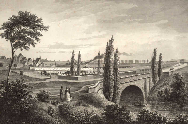 Der Dooser Brück = Kanal mit der Ludwigs Süd-Nord u. Nürnberg-Fürther Eisenbahn. Stahlstich von Alexander Marx aus dem Buch Pittoreske Ansichten des Ludwig-Donau-Main-Kanals. Gezeichnet, auf Stahl gestochen und herausgegeben von Alexander Marx. 1845. Kupferstecher in Nürnberg.